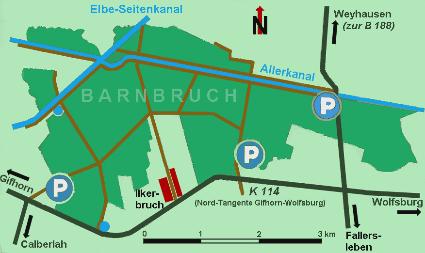 Skizze selbst gezeichnet von Benutzer:Axel Hindemith nach Vorlage, Mai 2005